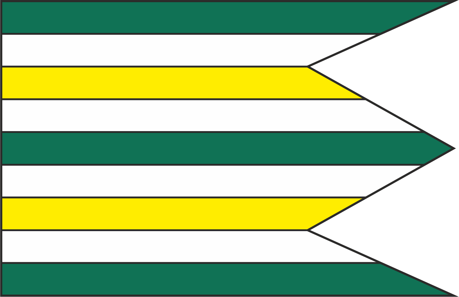 Vlajka Diviny